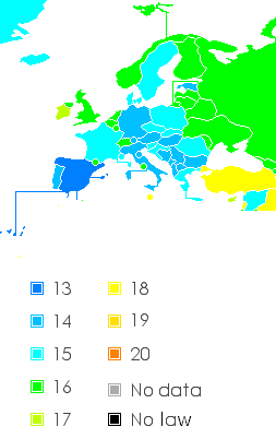 en: This map shows the legal age of consent for heterosexual sex in different countries around the world. Data about the age of consent & legality of homosexual sex is available but I did not include it in this map for clarity purposes. To be effective, other maps should be created for that. All sources are available on en.wikipedia. The original world map with US states can be found here : *fr (original): Cette carte expose l'âge légal de consentement à l'acte sexuel hétérosexuel dans differents pays du globe. Les informations à propos de l'âge légal et de la légalité de l'acte sexuel homosexuel sont disponibles mais je ne les ai pas incluses par souci de clareté. Pour être efficace, d'autres cartes devraient être créées à cet effet. Certains aspect de cette carte sont à clarifier : - Là où ceci était possible (les données étaient accessible), j'ai inclus les disparités à l'intérieur des pays (lorsque la loi diffère pour chaque état/province...). Ici, aux Etats-Unis et en Australie. - Dans certains pays l'âge légal peut varier suivant l'âge du/de la partenaire, j'ai choisi d'exposer l'âge légal de consentement à l'acte sexuel avec un partenaire de tout âge (mineur et adulte). - Dans certains pays l'âge légal de consentement est différent entre l'homme et la femme. Pour ceux-ci (ici, la Bolivie & le Botswana) j'ai choisi d'exposer l'âge légal de consentement féminin étant donné qu'il est généralement considéré comme plus "problématique" des deux. Une carte de l'âge légal de consentement à l'acte sexuel existait déjà mais je pense que celle-ci est plus claire (choix des couleurs) et légèrement plus complète. C'est pourquoi je l'ai recréé. La carte précédente peut être trouvée ici : La carte du monde avec les états américains se trouve ici